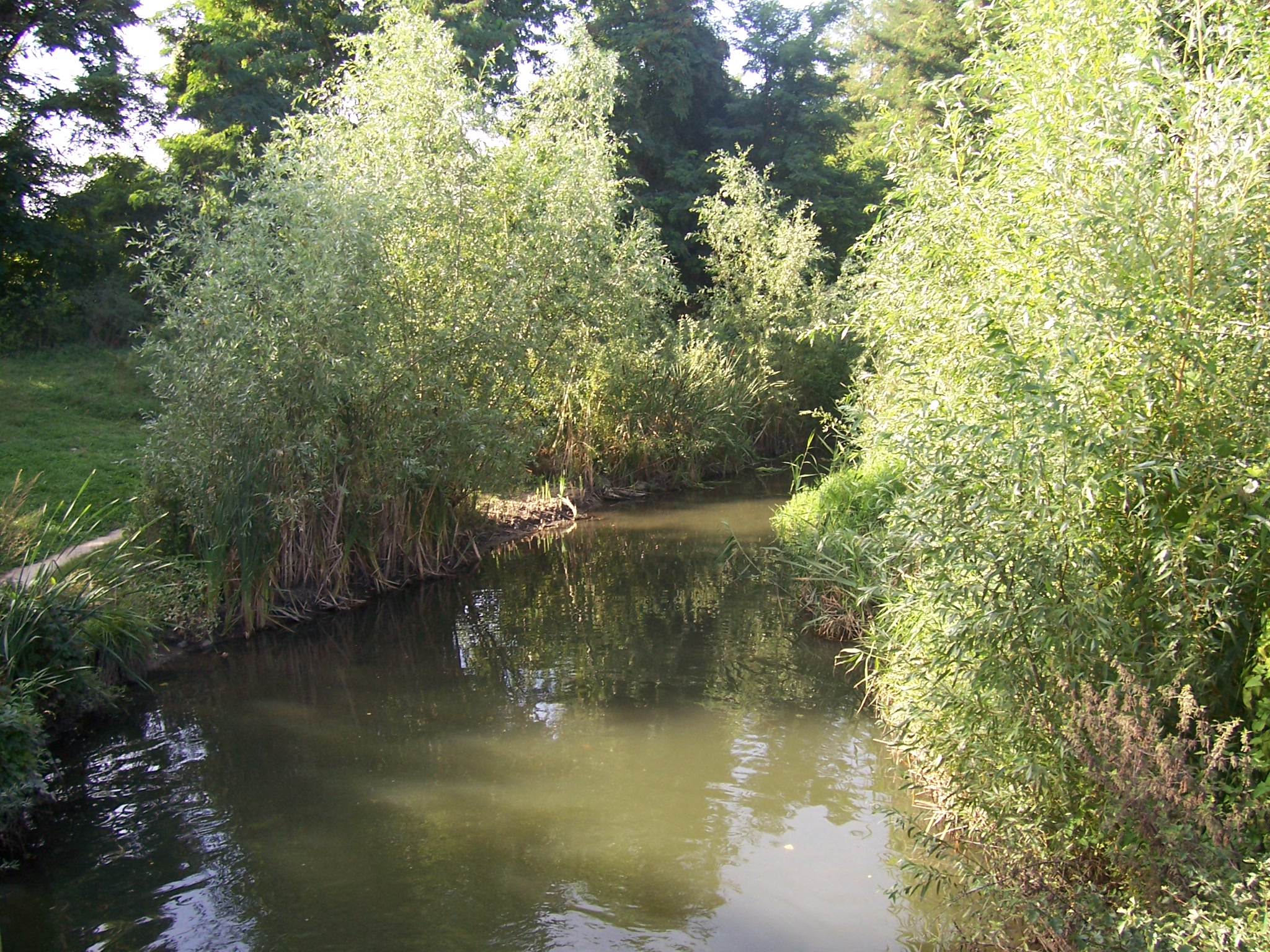 La Bièvre à Fresnes (Val de Marne) Photo Mica 2006